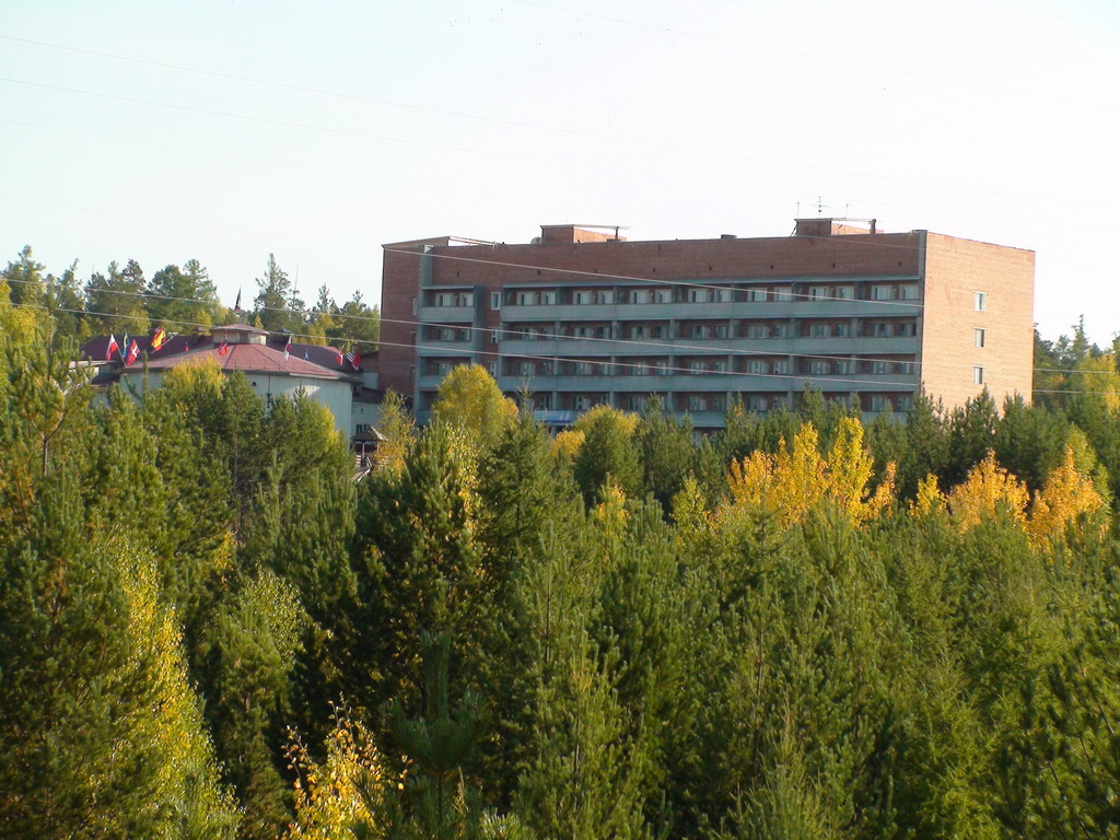 Курорт "Русь", Усть-Илимский район This image is related to the protected area of Russia number 3810408